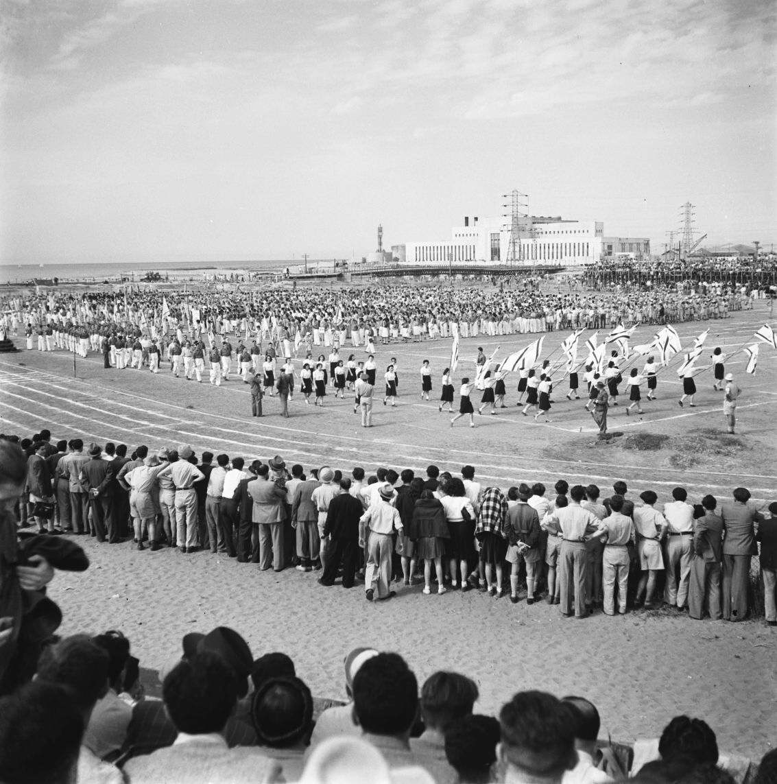 אוסף צילומים של הצלם זולטן קלוגר טווח מספרי התשלילים 26838 - 26909: הכינוס השמיני הארצי של המכבי